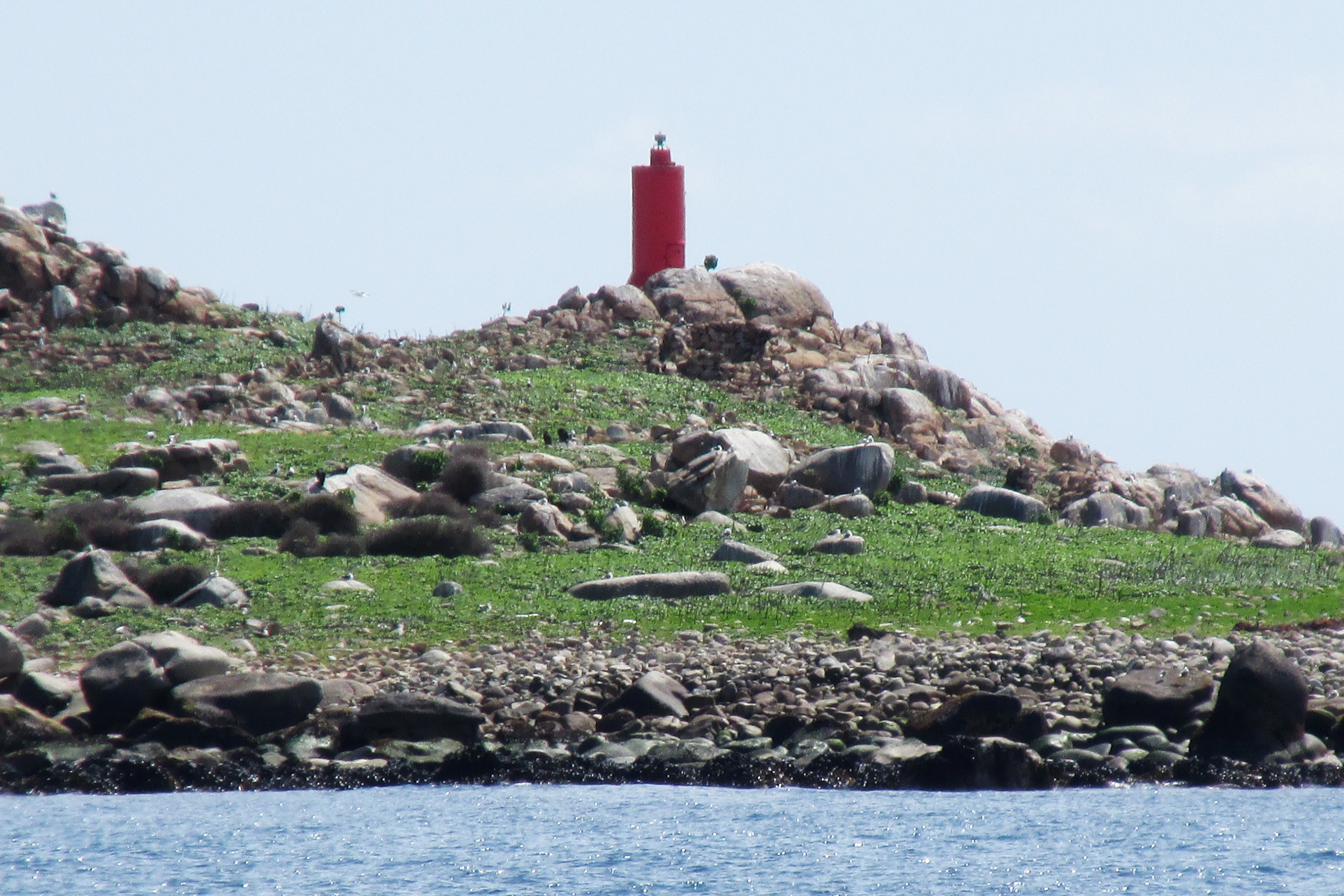 Faro en Islote de los Huevos, frente a Los Vilos, región de Coquimbo Chile